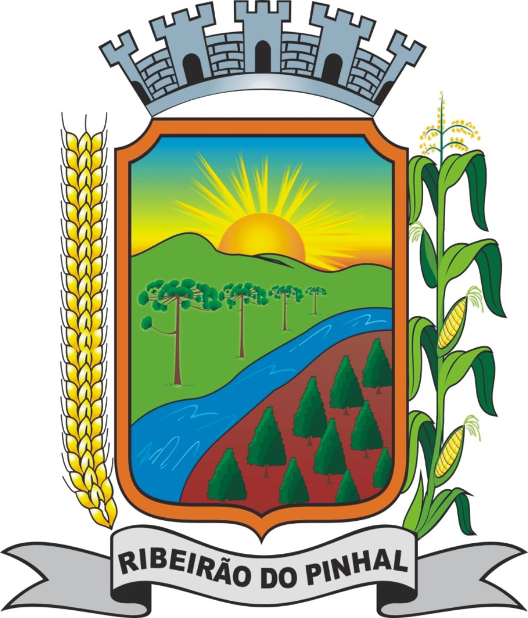 Brasão do Municipio de Ribeirão do PInhal